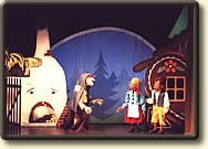 Ausschnitt aus "Hänsel und Gretel"